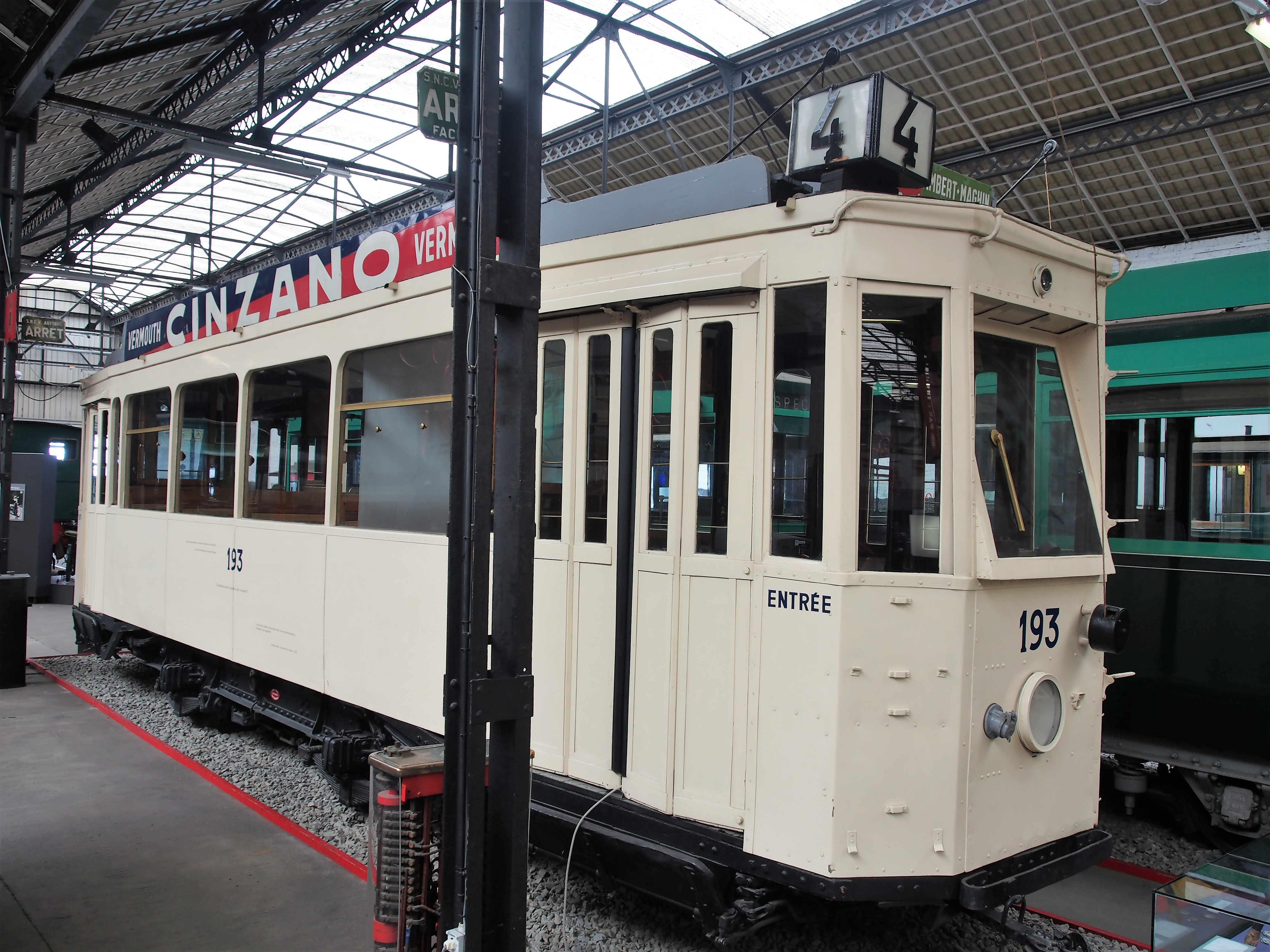 Photographed in Musée des transports en commun (Liège).